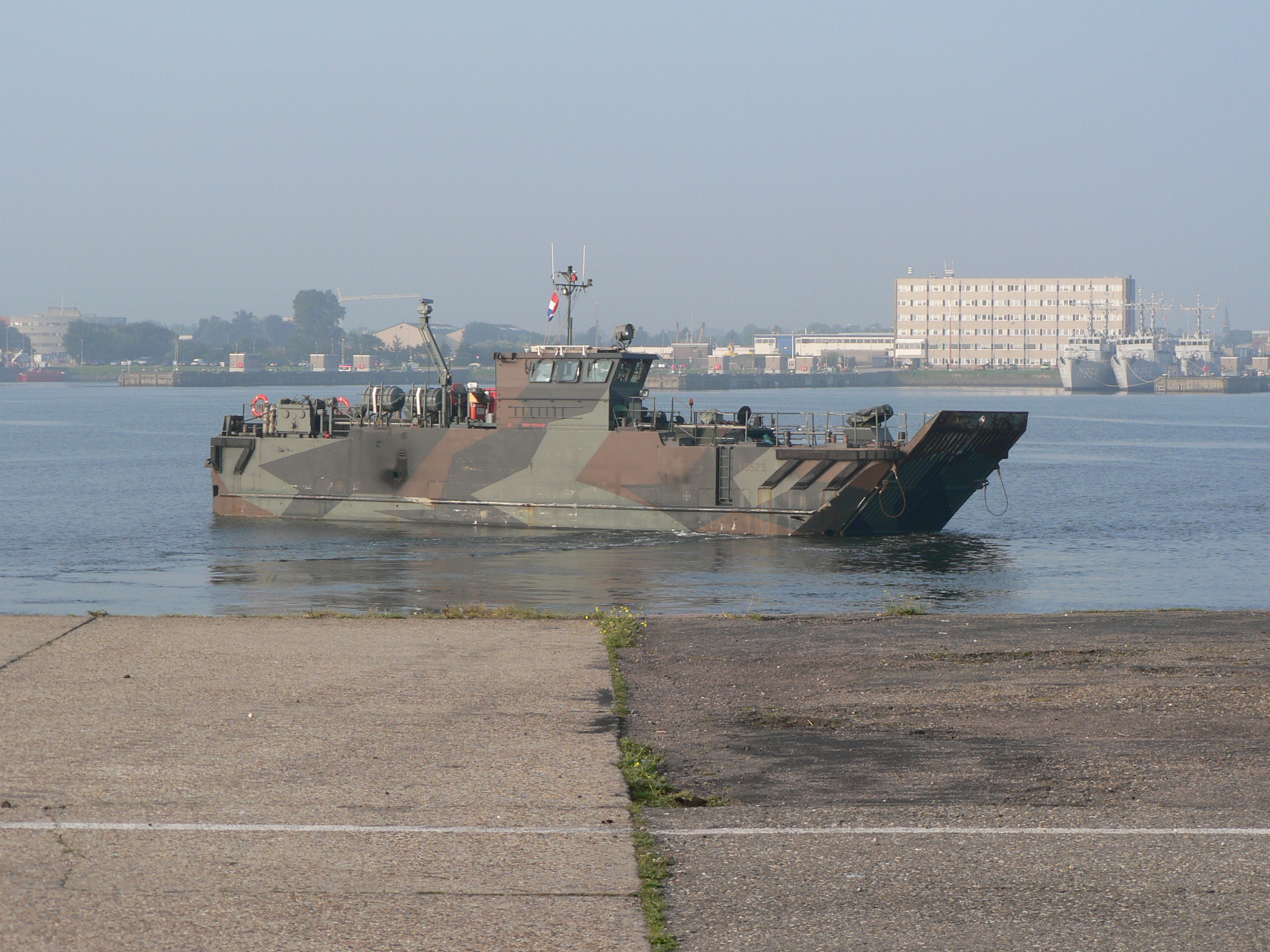 deze foto is ddor mezelf gemaakt en daardoor mij eigendom...deze foto mag door iedereen gebruikt worden.